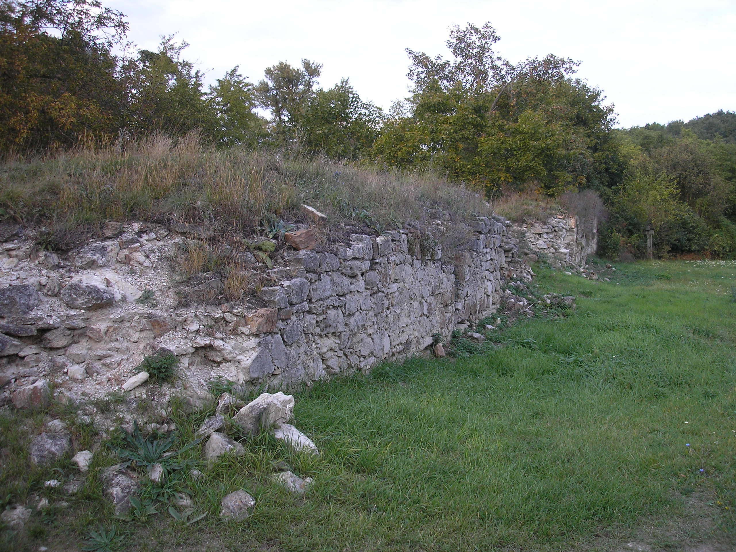 A pátkai víztározó római korból való gátjának romjai This is a photo of a monument in Hungary. Identifier: 3799